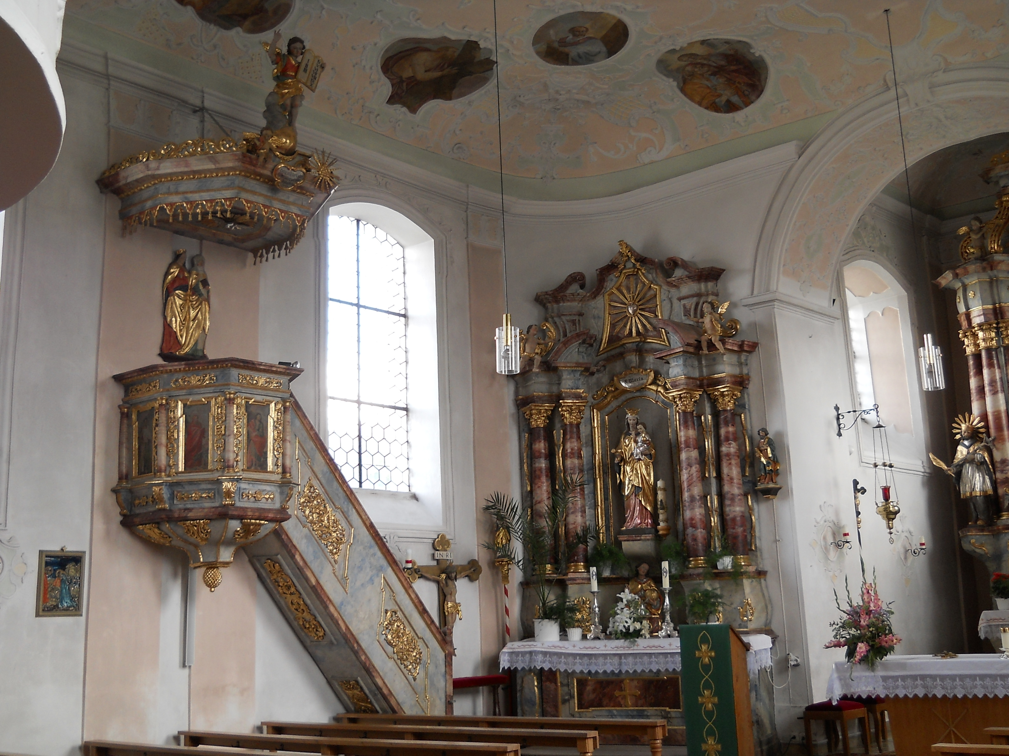 Kanzel und linker Seitenaltar in der Pfarrkirche St. Ulrich in Kevenhüll, Gemeindeteil von Beilngries im oberbayerischen Landkreis Eichstätt